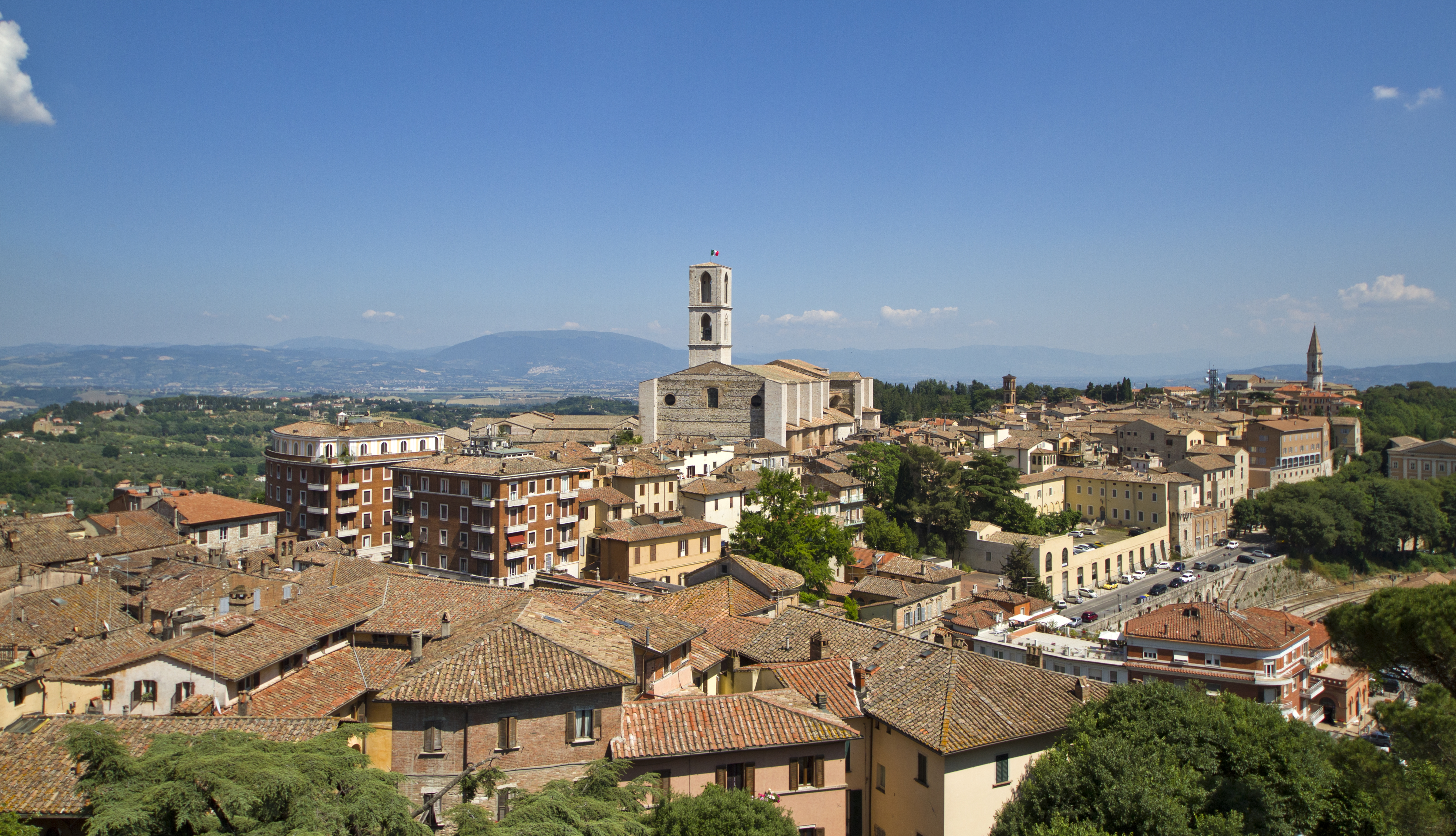 Perugia, Italy